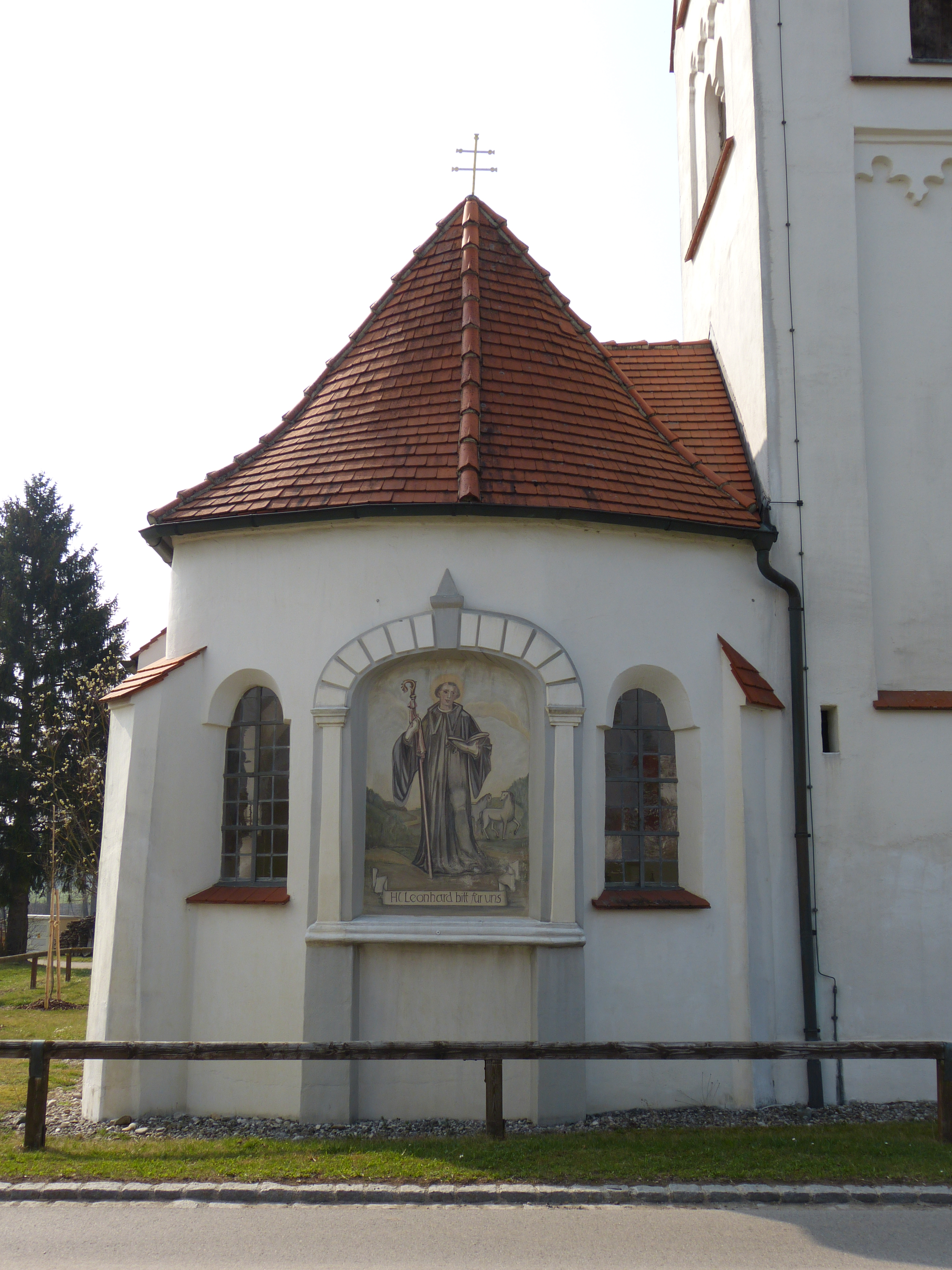 St. Leonhard, Gottenau, Gemeinde Markt Rettenbach, Landkreis Unterallgäu, Bayern